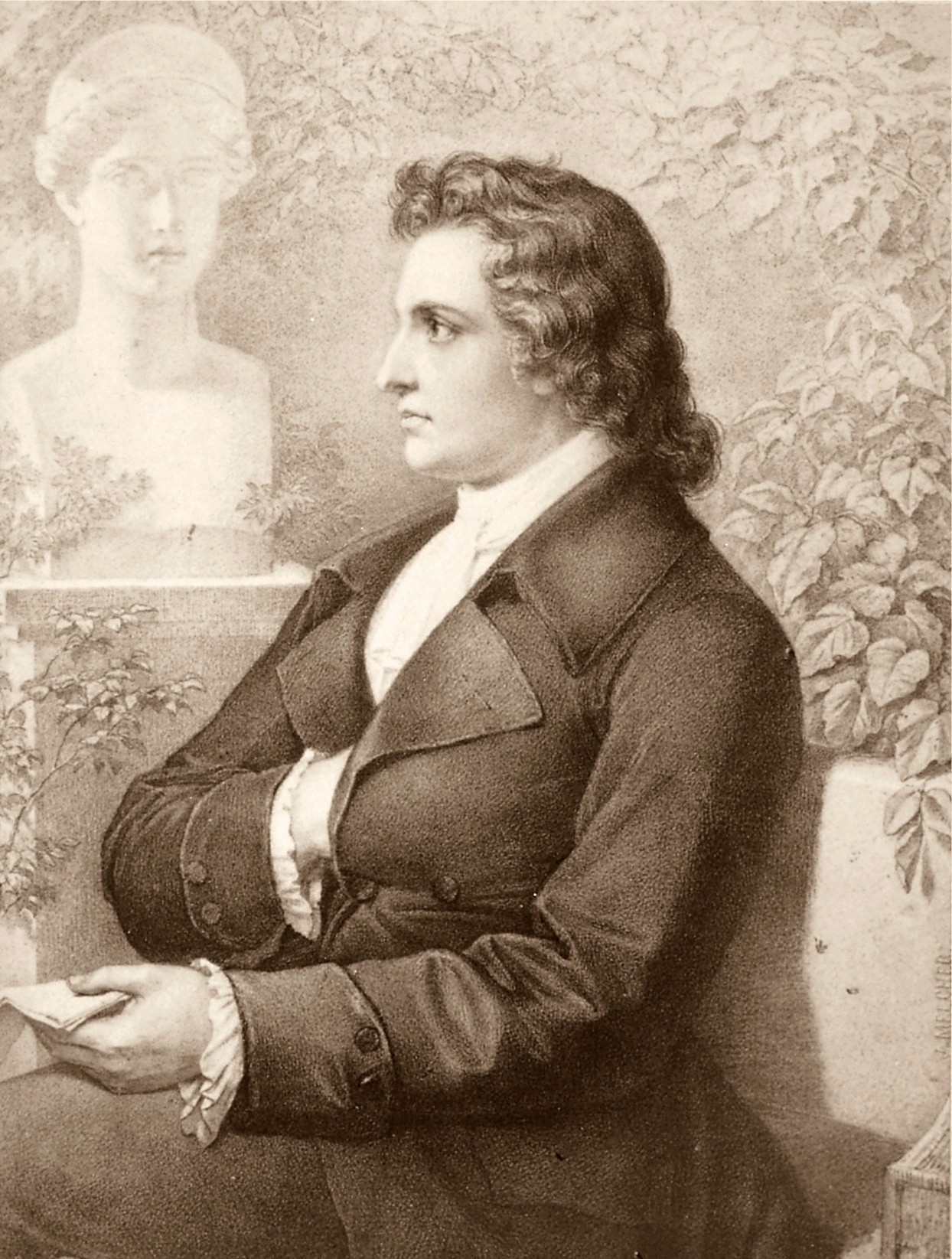 Johann Wolfgang von Goethe 1749-1832 deutscher Dichter.